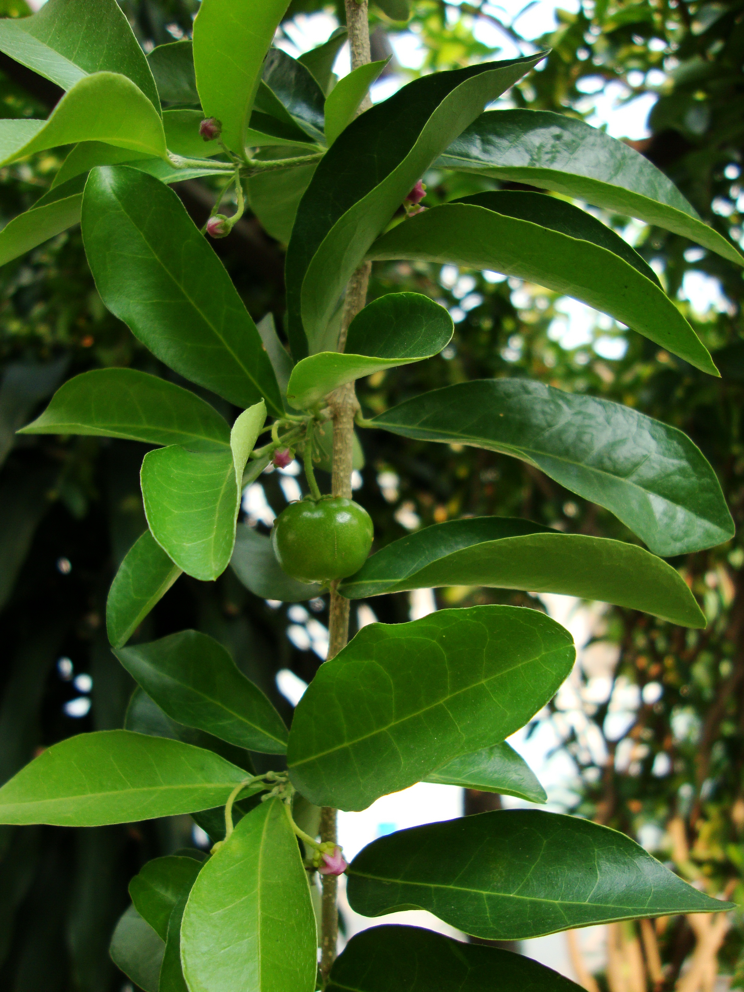 Malpighia glabra L., 1753